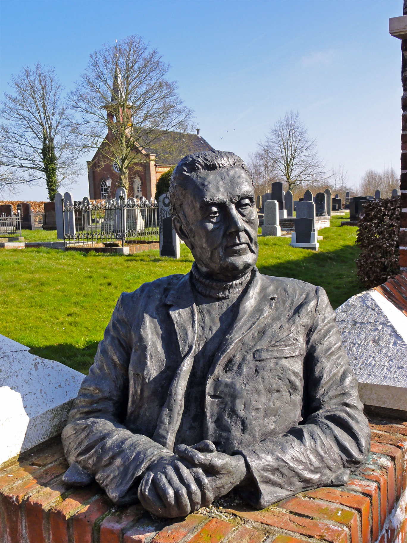 Buste van Jan Boer door Greet Grottendieck bij Kloosterweg 17 in Rottum